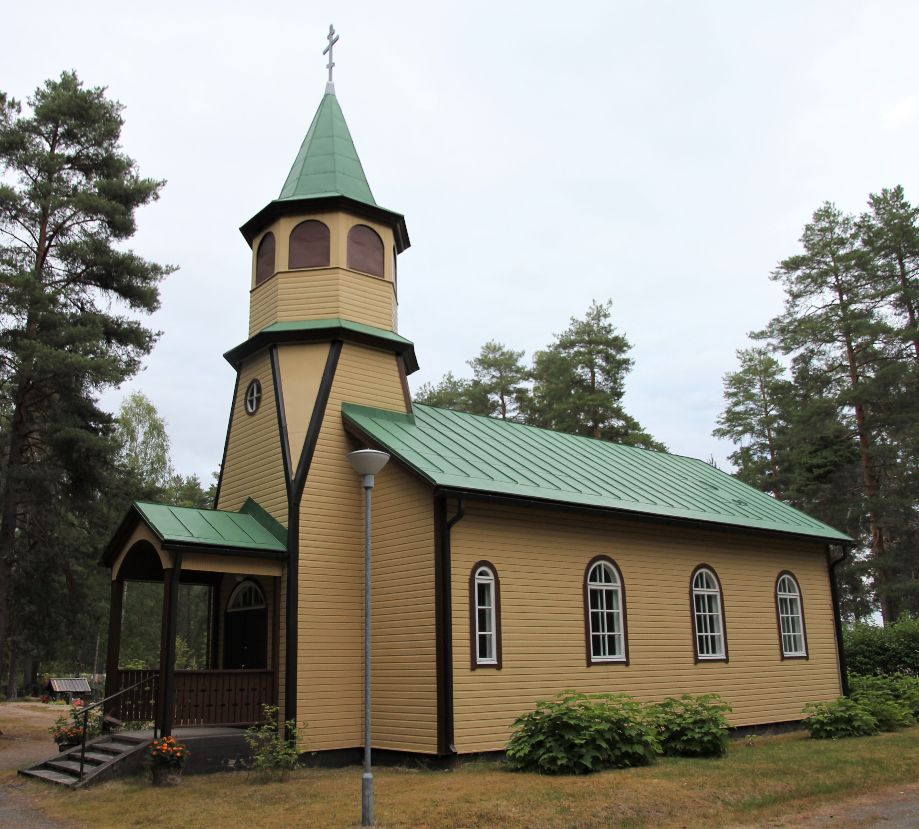 Tervon ortodoksinen rukoushuone eli Tervon pyhän profeetta Elian rukoushuone on Rautalammin ortodoksisen seurakunnan pyhäkkö, ja sijaitsee Tervon kirkonkylällä osoitteessa Kirkkotie 9, Tervo.